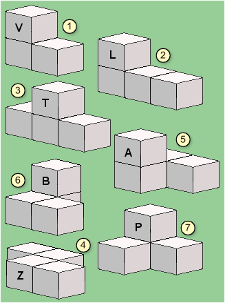 Egen teckning